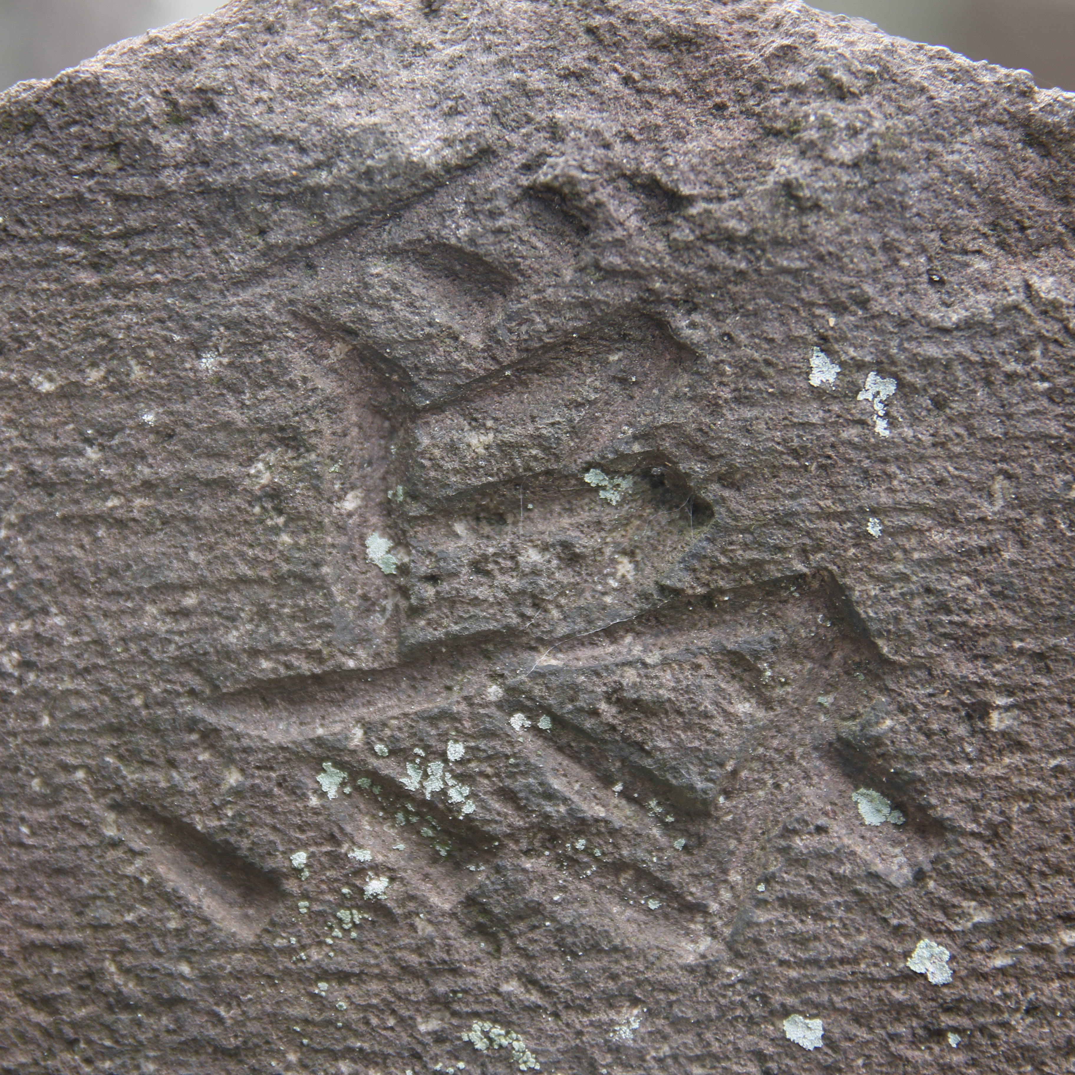 円福寺（東京都板橋区）の墓塔に刻まれた「爲」